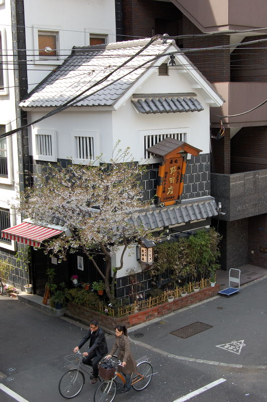 うなぎ屋（東京・港区東麻布1-5-4、赤羽橋駅・神谷町駅最寄り、創業160余年の老舗、天然素材にこだわる江戸前うなぎの店「野田岩」）